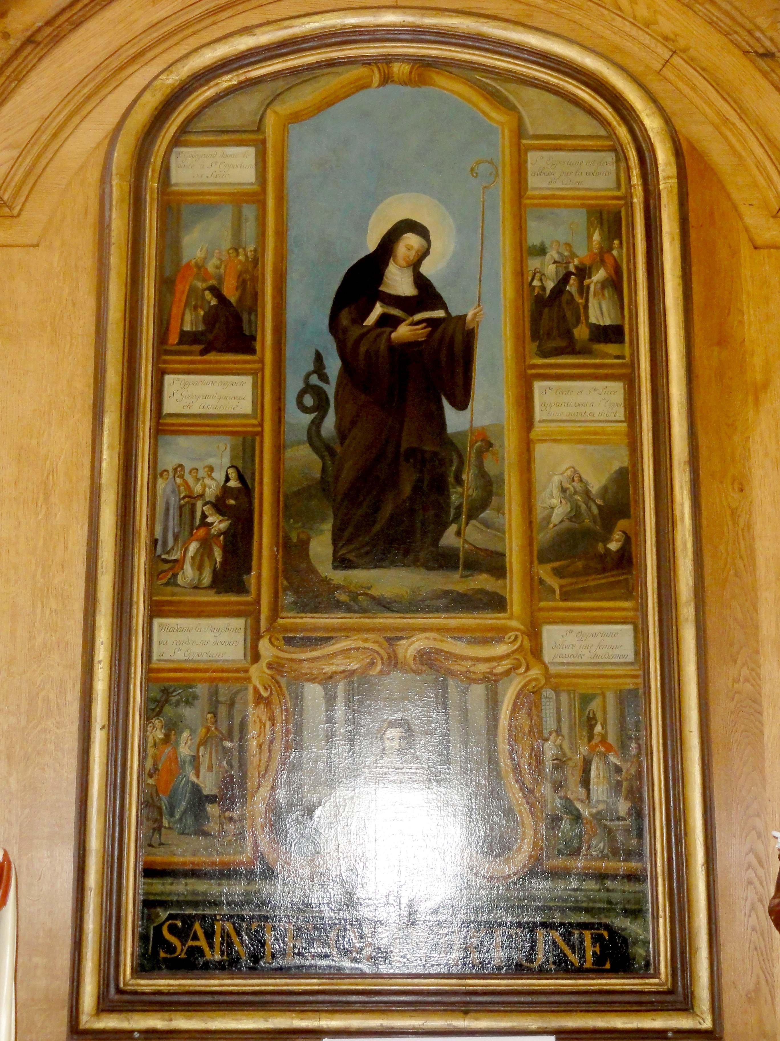 Retable de sainte Opportune.